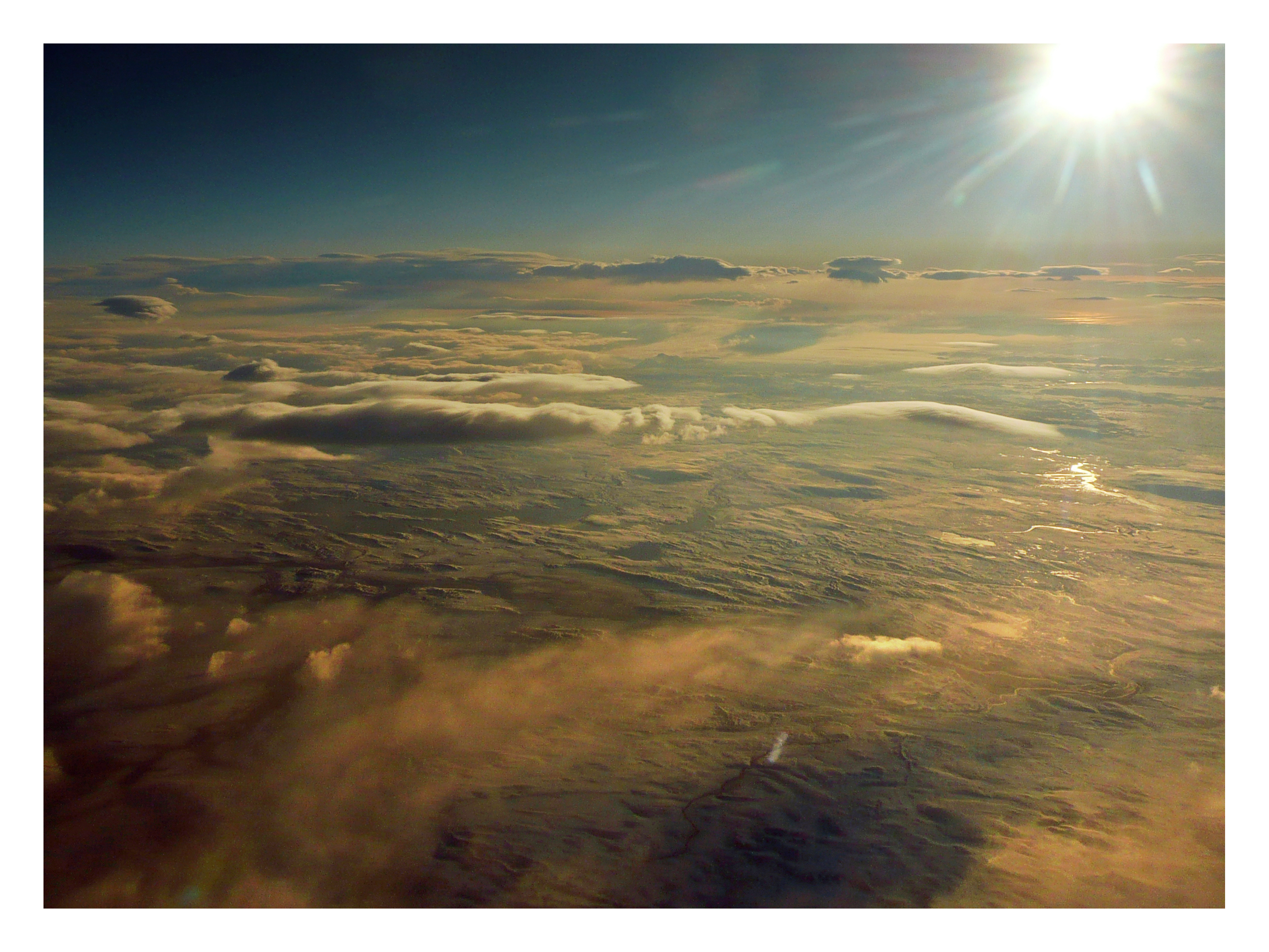 Vatnajökull I